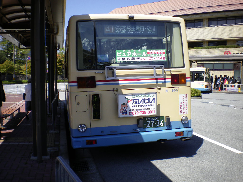 後川まで行く41系統